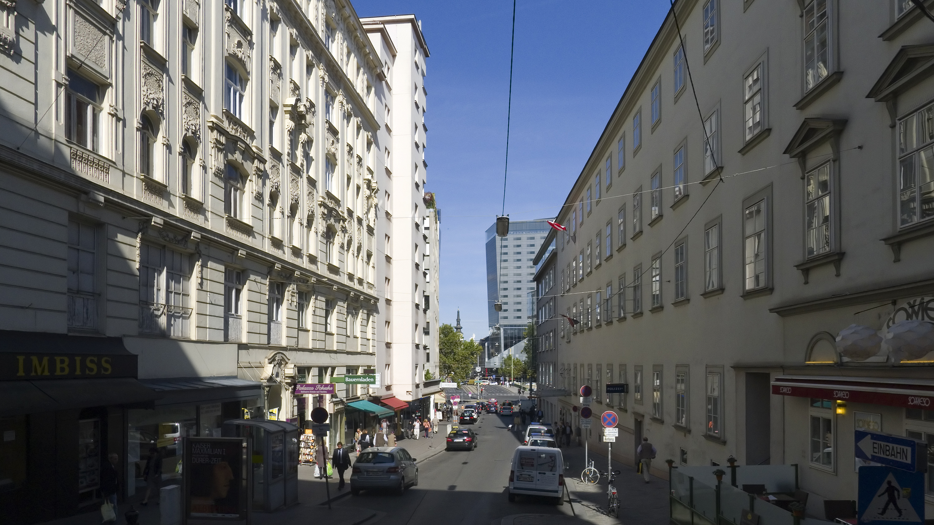 Laurenzerberg in Wien 1 beim Fleischmarkt Richtung Norden